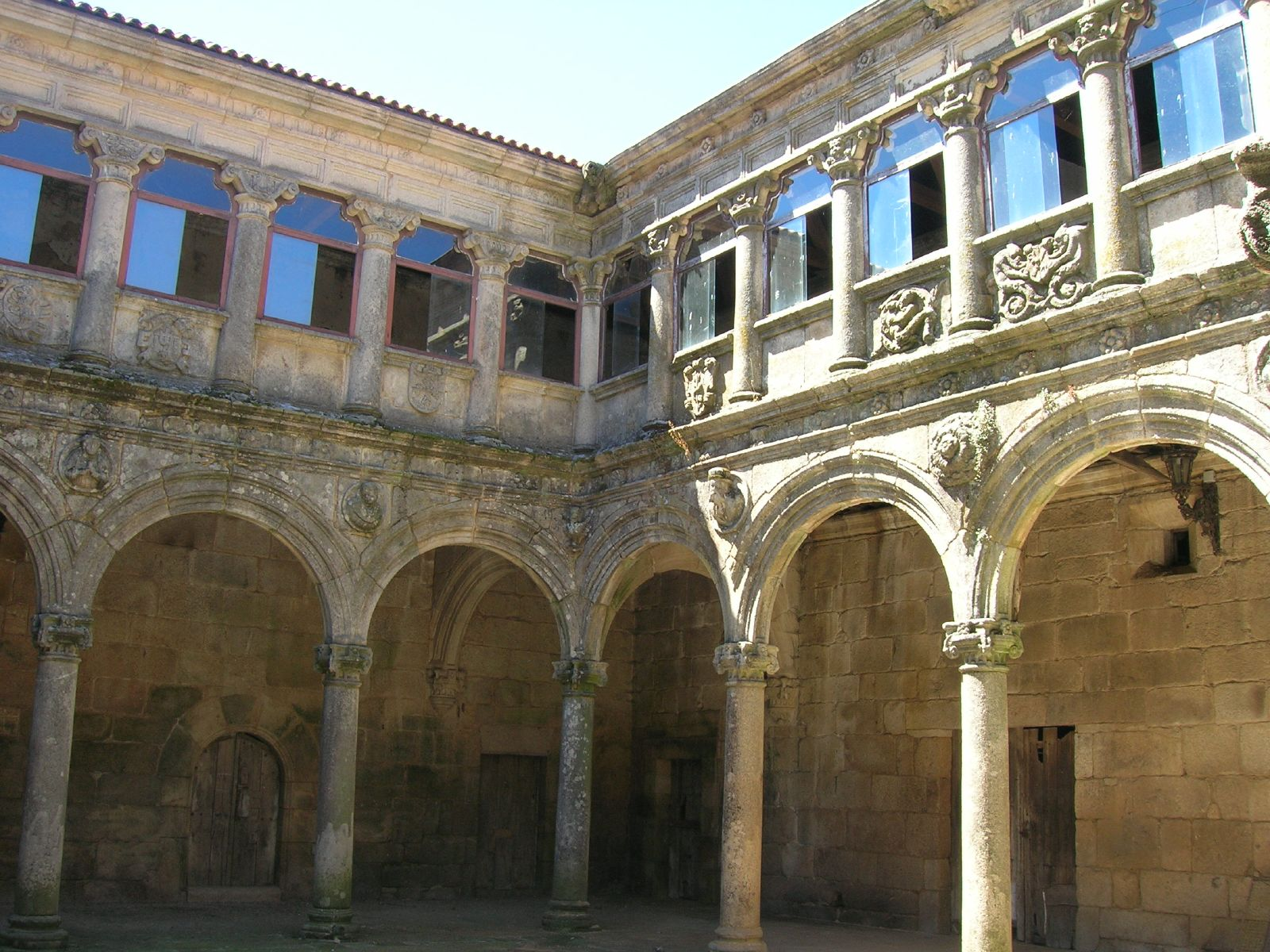 Monasterio de Montederramo, Claustro de la Portería, con columnas de capiteles de inspiración jónica y medallones de personajes en las enjutas de los arcos.